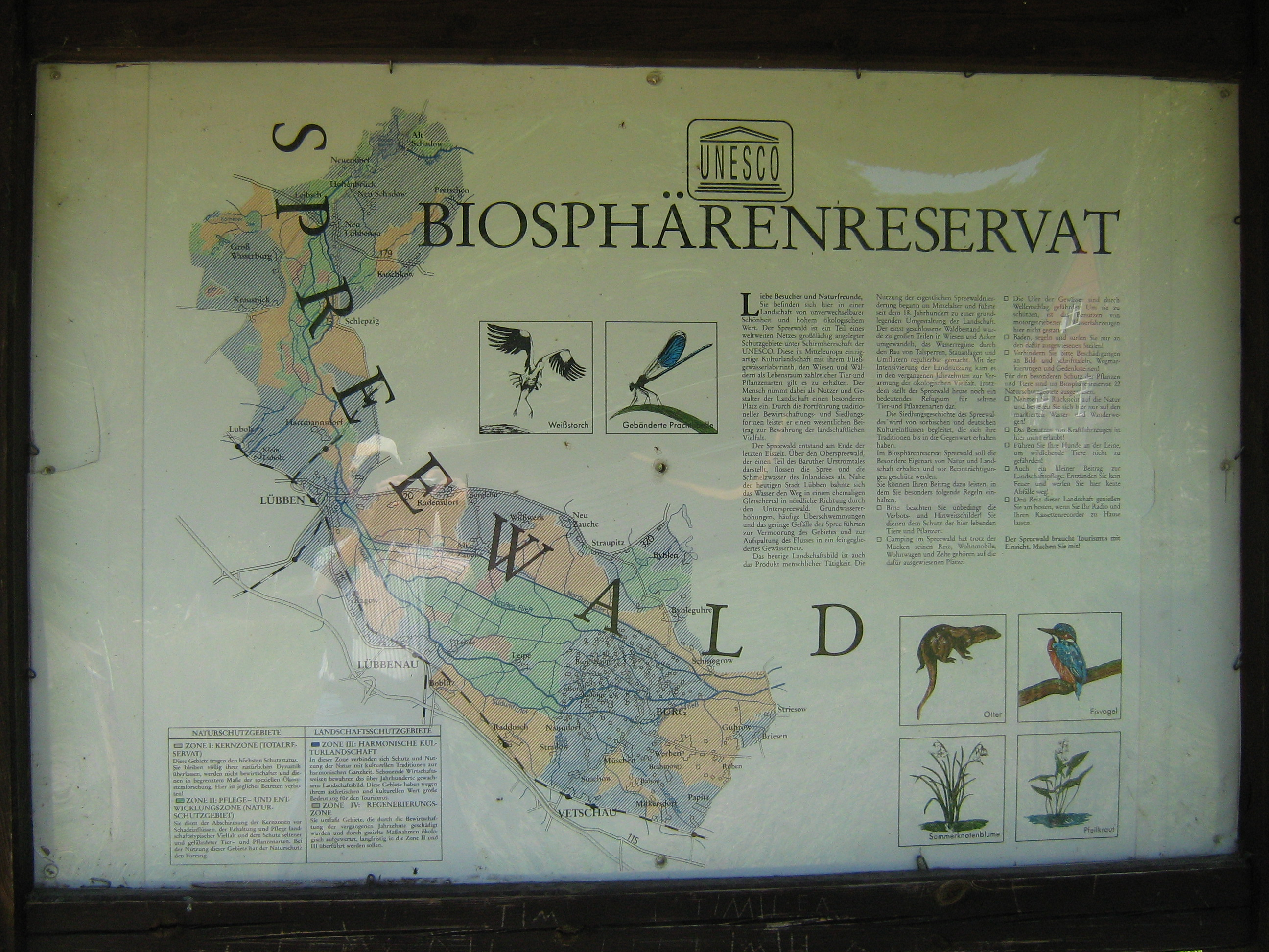 Hinweistafel: Biosphärenreservat